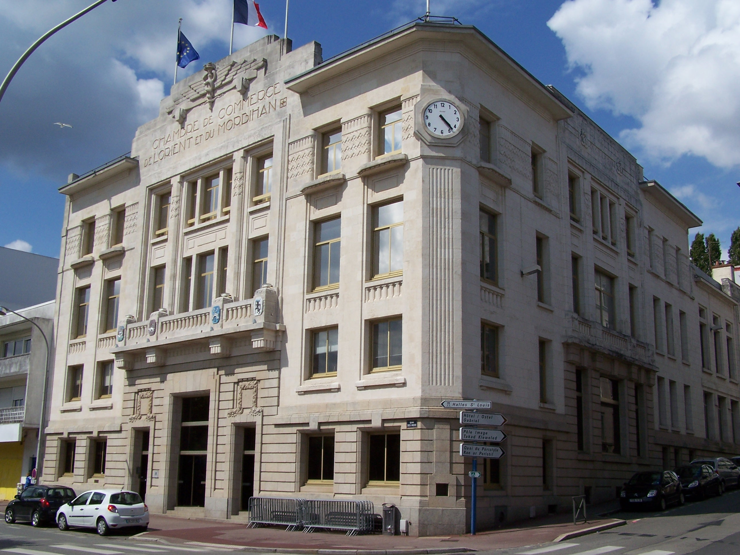 La chambre de commerce de Lorient et du Morbihan sur les quais de Lorient. .